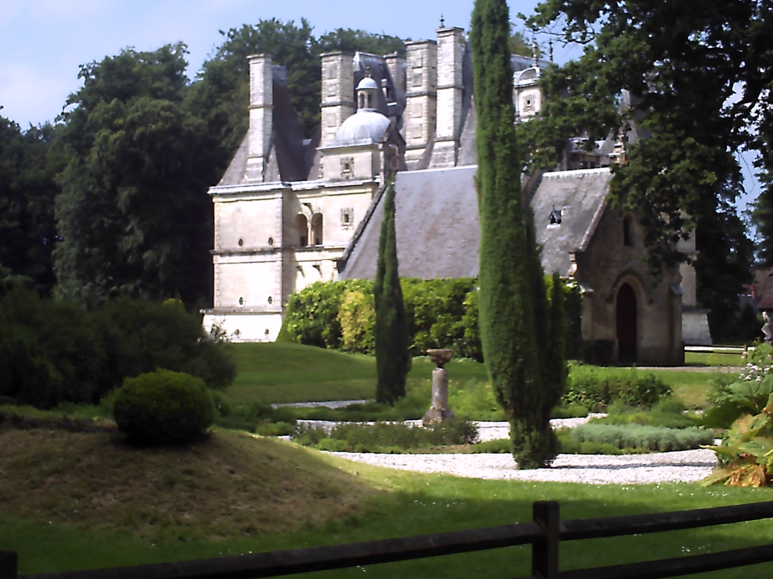 chateau de bailleul